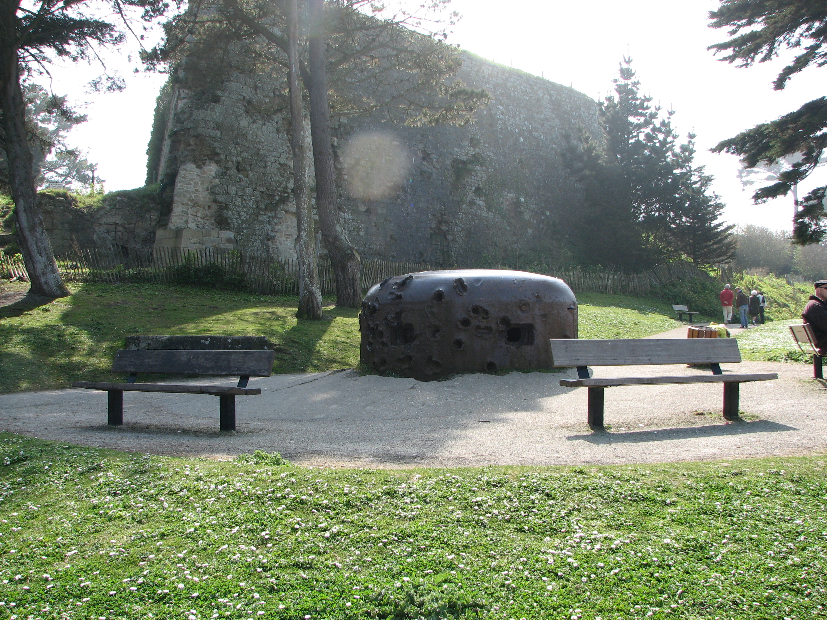 Promenade autour de la cité d'Aleth à Saint-Malo avec l'une des tourelles-blockhaus et en arrière plan, le vestige du mur gallo-romain. La tourelle présente des traces des tirs américains, témoins des durs combats pendant la libération de Saint-Malo.Pedestrian trail around the cité d'Aleth with a German turret heavily hit by American fire in 1944. In the background, part of the former Gallo-Roman wall.